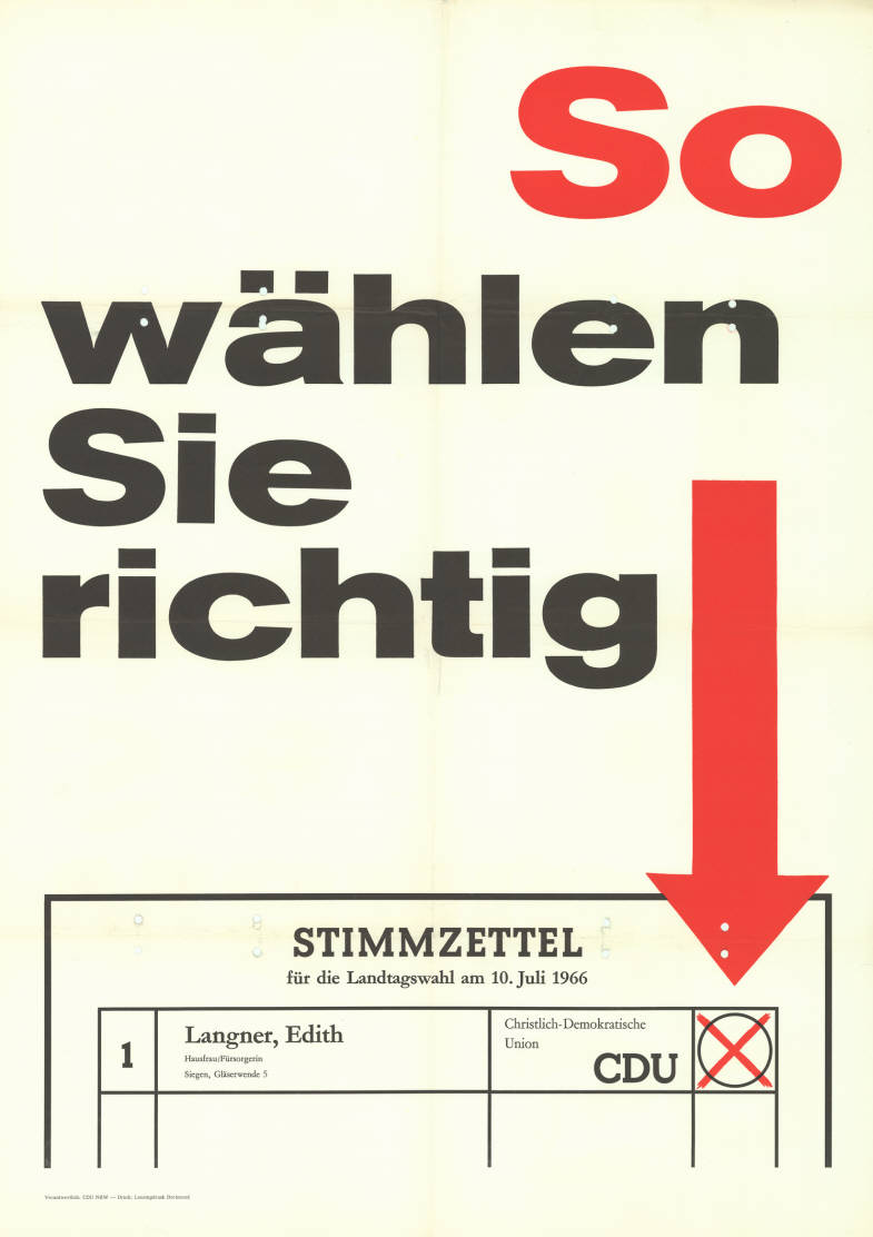 So wählen Sie richtig Stimmzettel ... 1 Langner, Edith CDU Hausfrau, Fürsorgerin ... Abbildung: Stimmzettel - Stimmkreuz Plakatart: Kandidaten-/Personenplakat ohne Porträt Auftraggeber: Verantw.: CDU NRW Drucker_Druckart_Druckort: Lensingdruck, Dortmund Objekt-Signatur: 10-009 : 543 Bestand: Landtagswahlplakate Nordrhein-Westfalen (10-009) GliederungBestand10-18: Landtagswahlplakate Nordrhein-Westfalen (10-009) » CDU Lizenz: KAS/ACDP 10-009 : 543 CC-BY-SA 3.0 DE